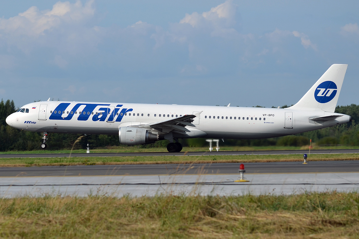 UTair, VP-BPO, Airbus A321-211